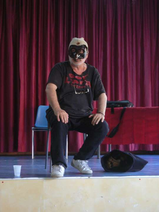 Antonio Fava in una presentazione di alcune sue maschere presso l'Auditorium Comunale di Scandale (Kr)